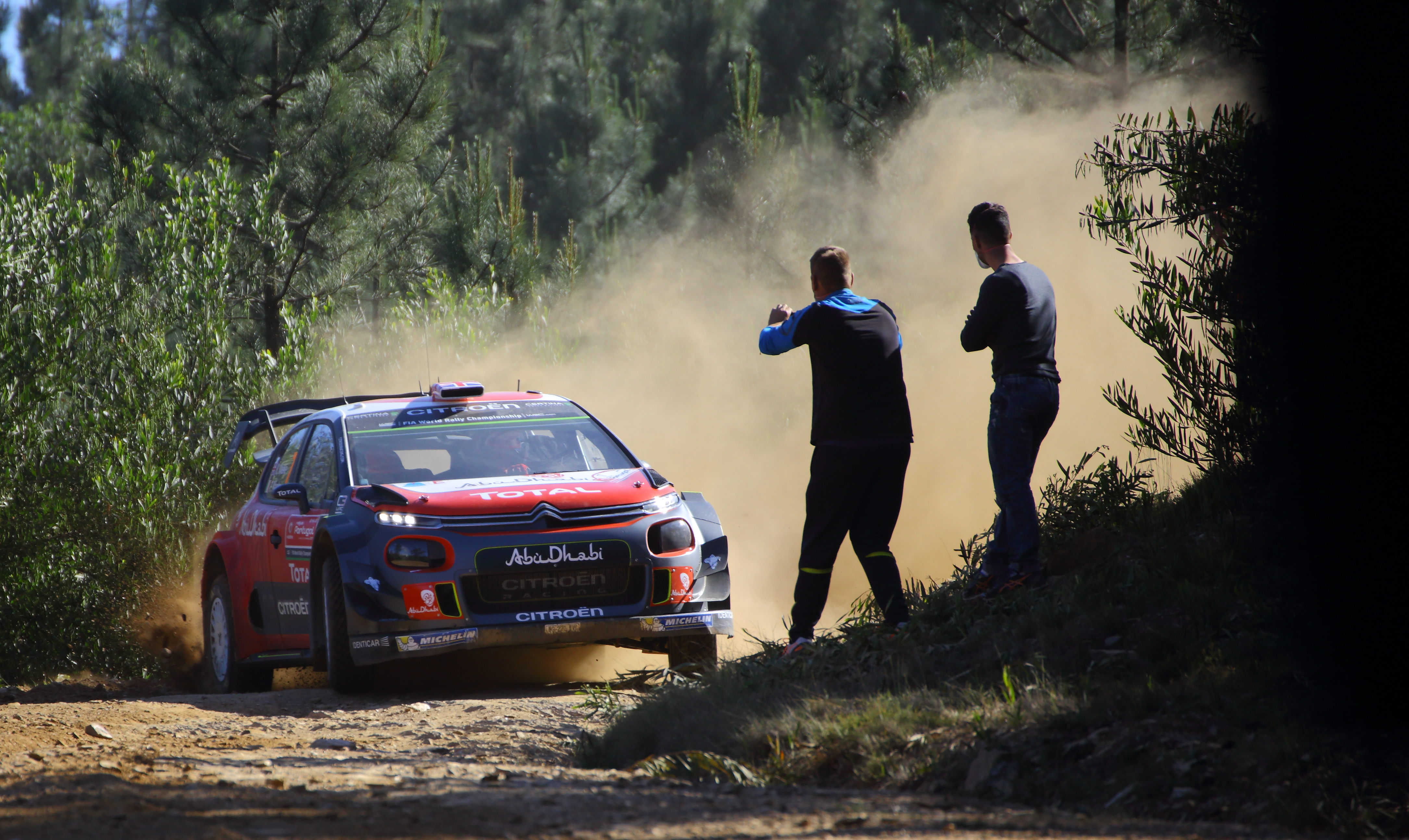 2017 Rally Portugal